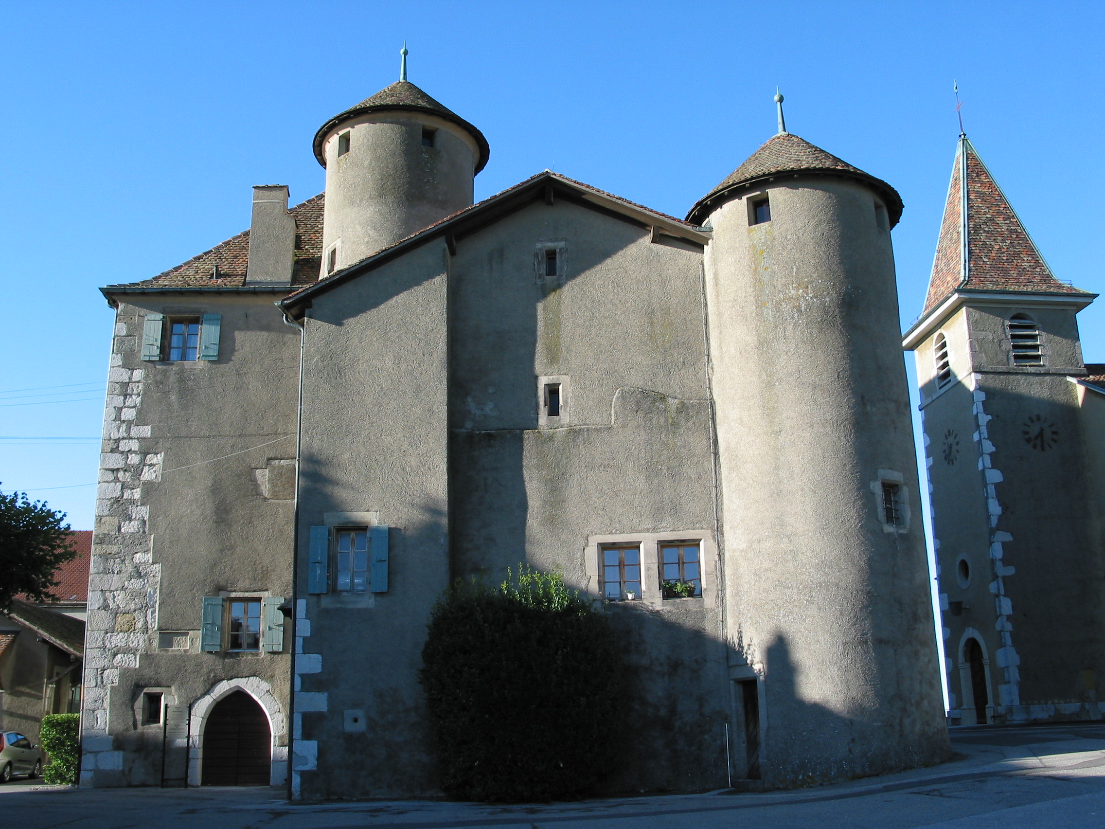 Commanderie de Compesières